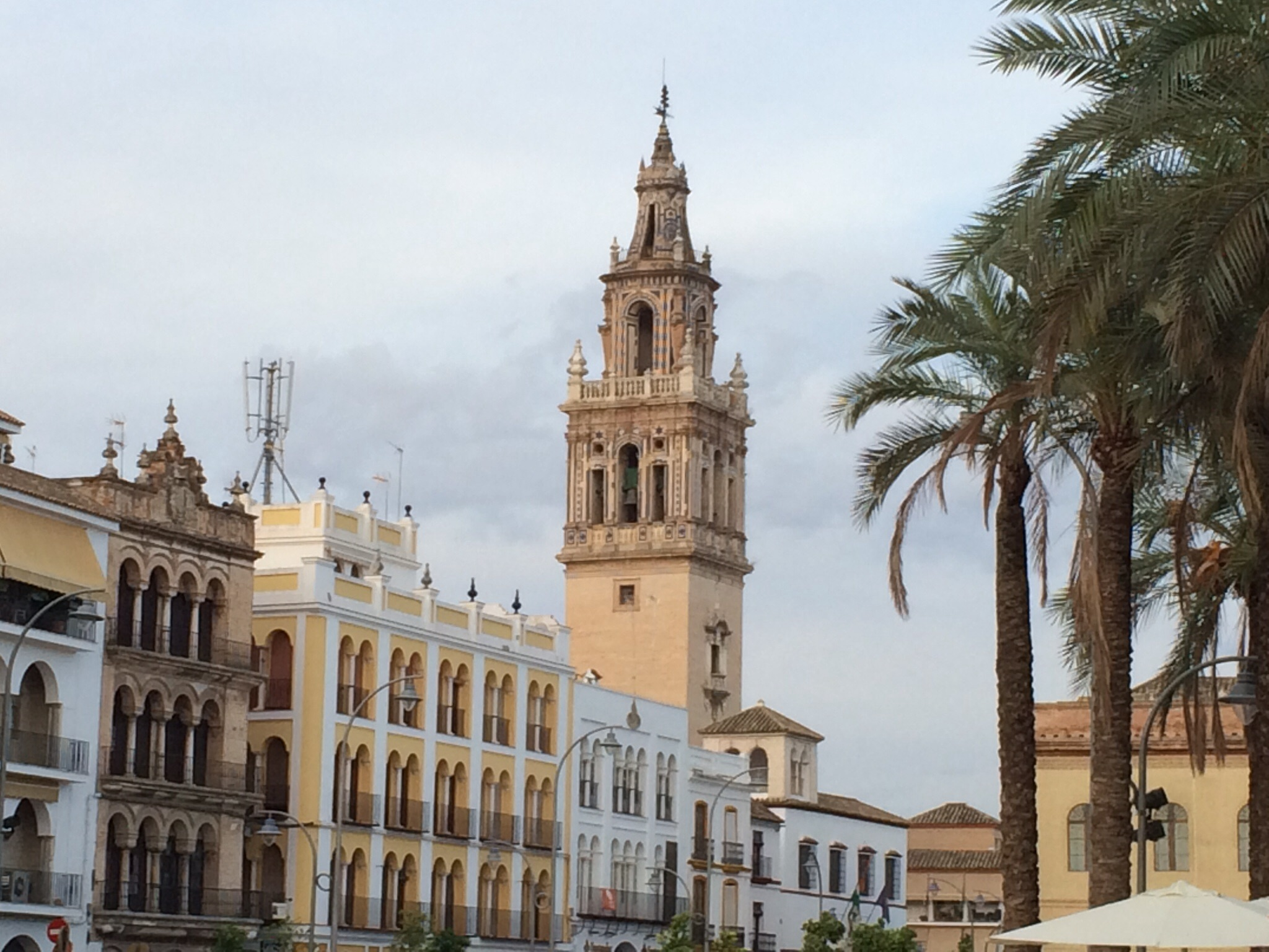 Iglesia de Santiago, Écija